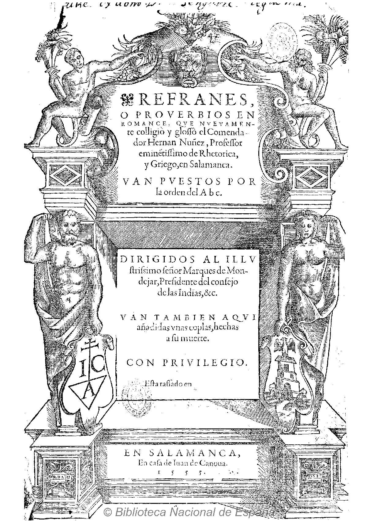 Refranes o Prouerbios en romance que nueuamente colligió y glossó el comendador Hernan Nuñez ... van puestos por la orden del Abc ; van tambien aqui añadidas unas coplas hechas a su muerte Autor: Núñez, Hernán (ca. 1475-1553) Fecha: 1555 Datos de edición: En Salamanca, en casa de Iuan de Canoua (Cánovas, Juan de (fl. 1553-1569).)